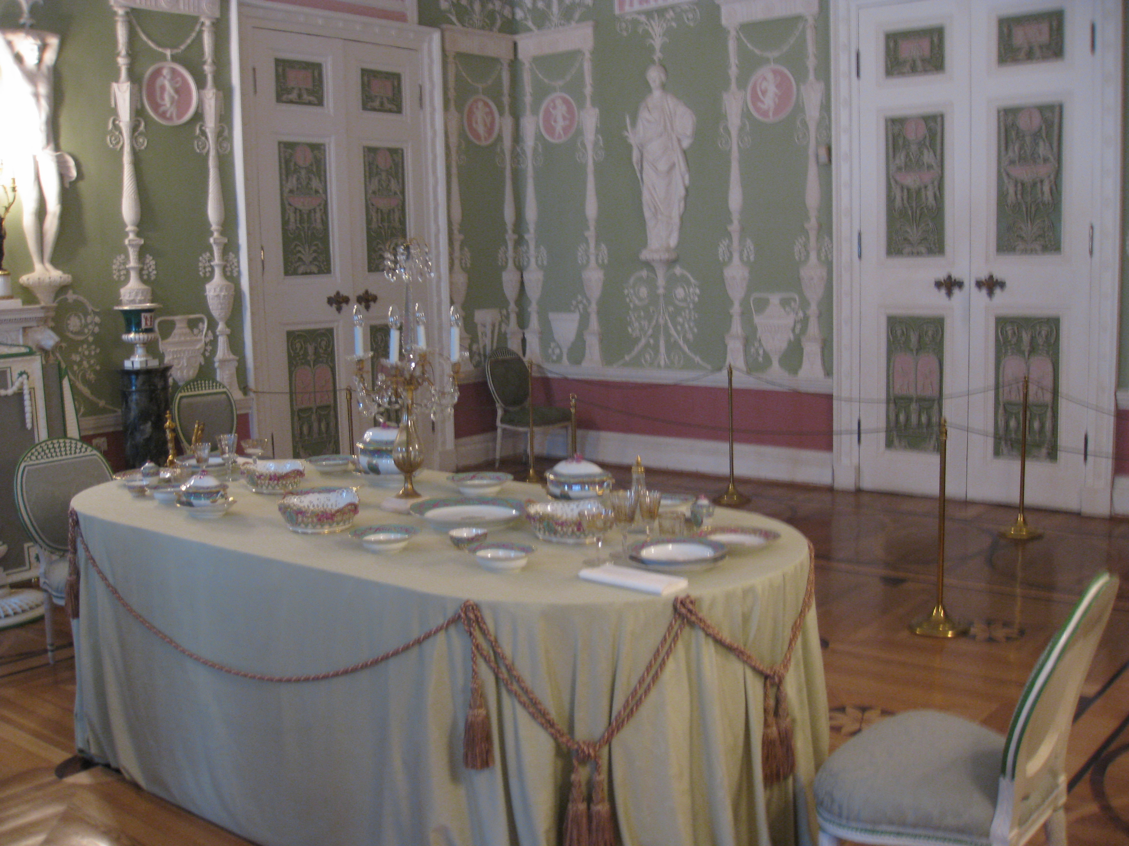 Catherine Palace ארמון יקתרינה הגדולה בפושקין